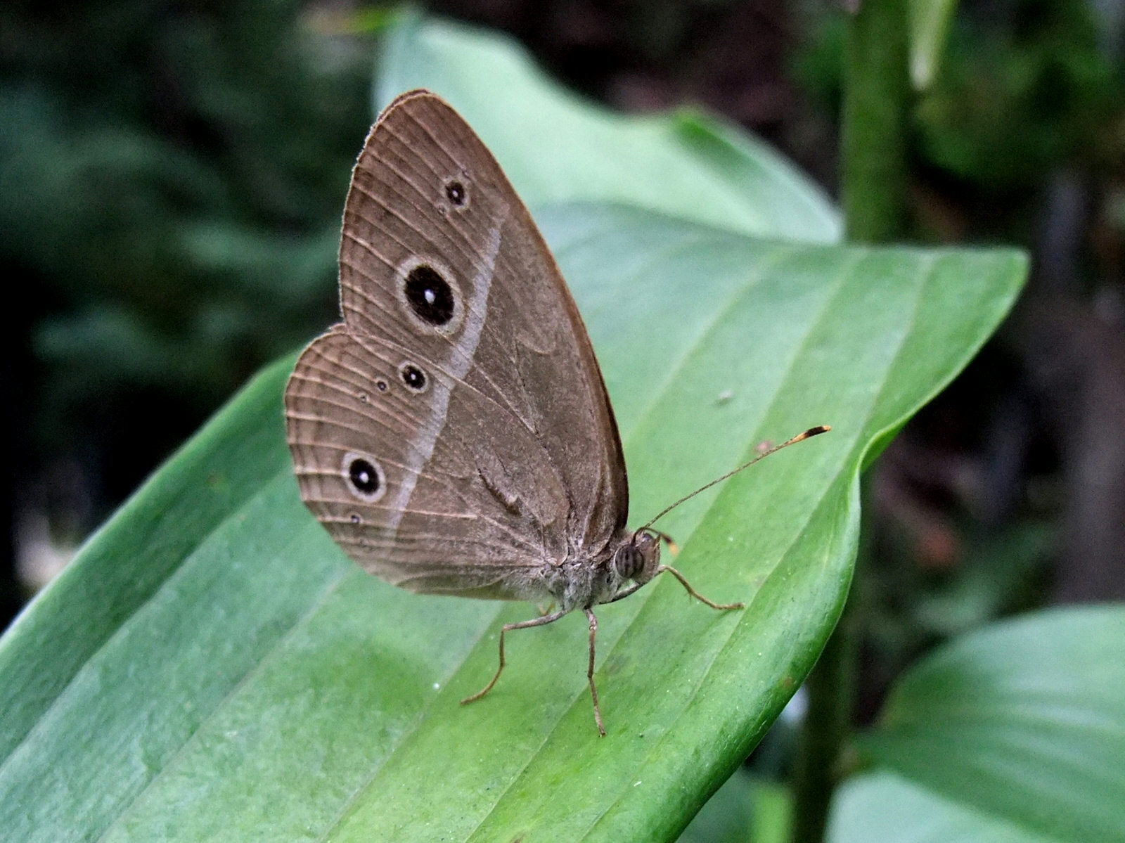 ヒメジャノメ。